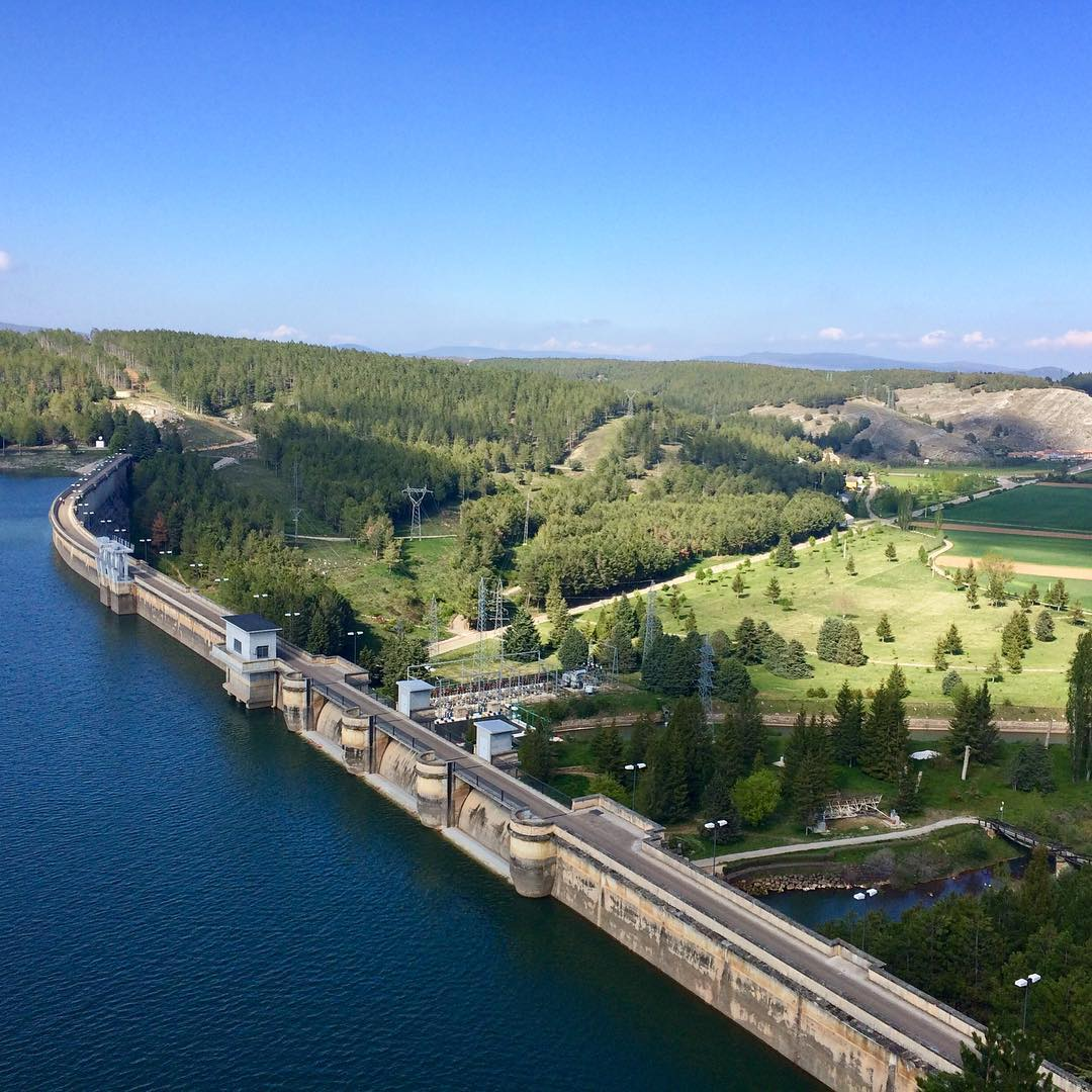 Presa de Aguilar de Campoo, por Andrea Gama